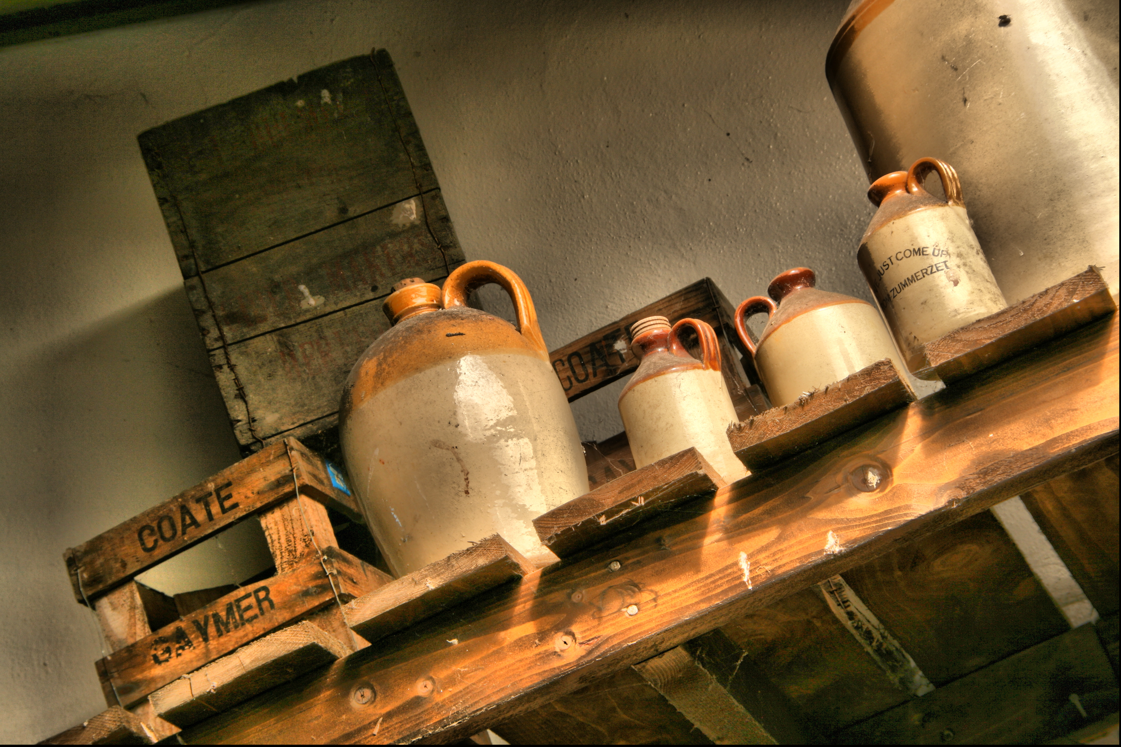 Somerset Cider Jugs